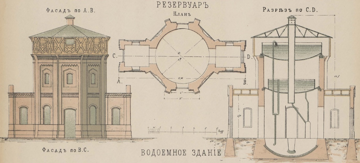 Водонапорная башня Петербург-Варшавской железной дороги